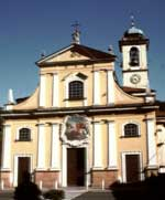 La chiesa parrocchiale di Bisuschio, in provincia di Varese